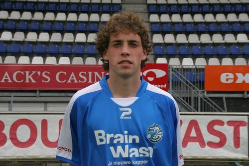 Zelf gemaakte afbeelding